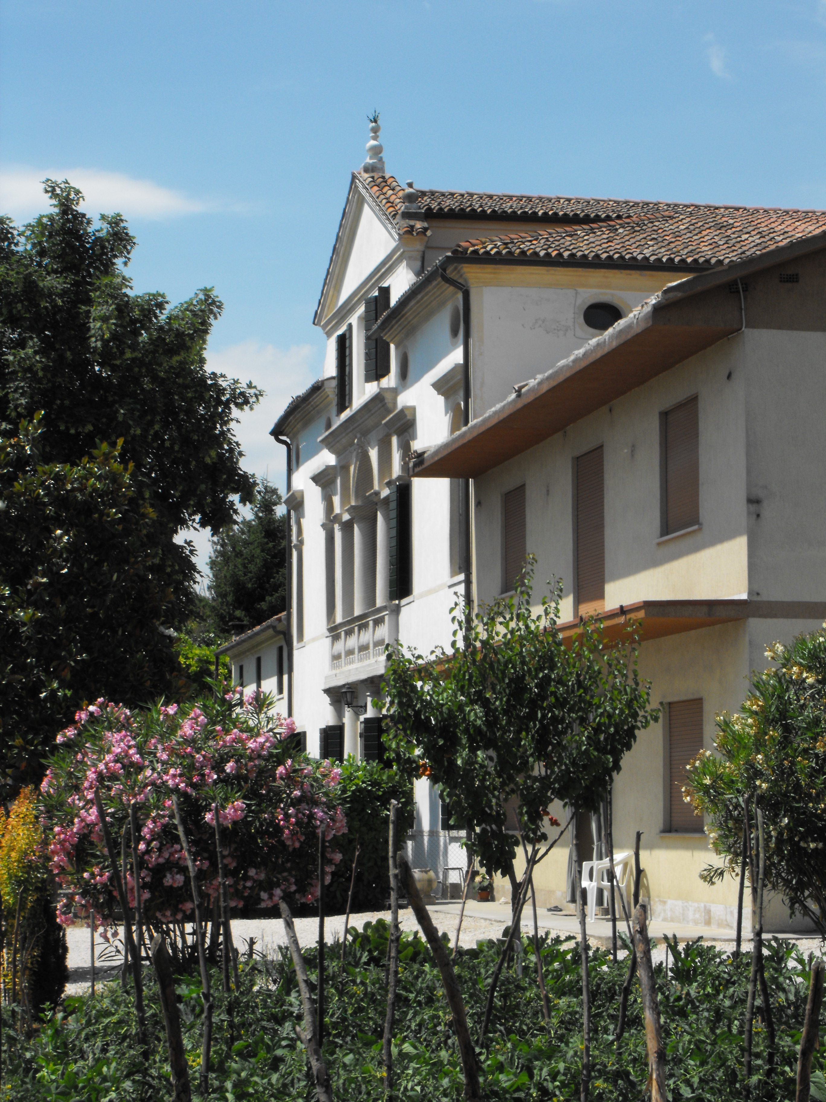 Ca' Lin, villa veneta di Trivignano.